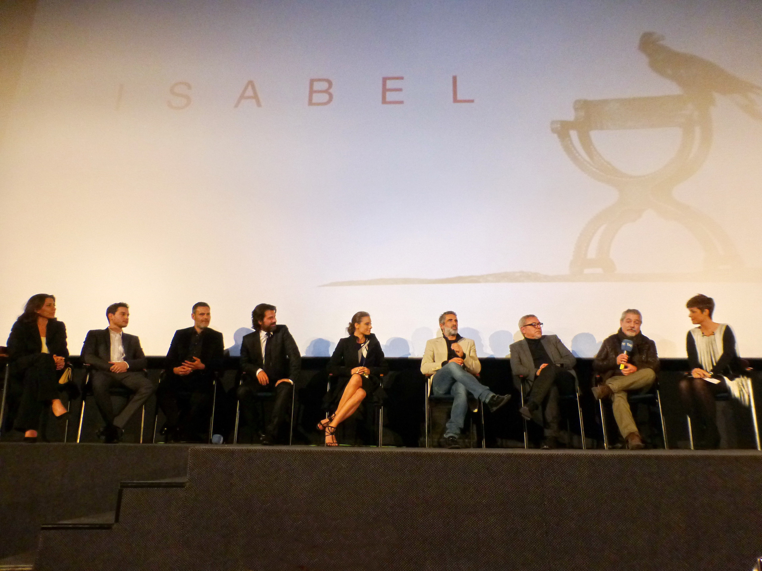 Algunos de los actores, director y guionista de Isabel en el pase especial de proyección último capítulo de la 2ª temporada, en el cine Capitol de Madrid.